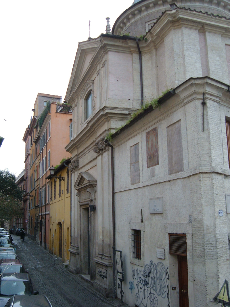 Chiesa di Sant'Eligio degli orefici, a Roma, nel rione Regola.